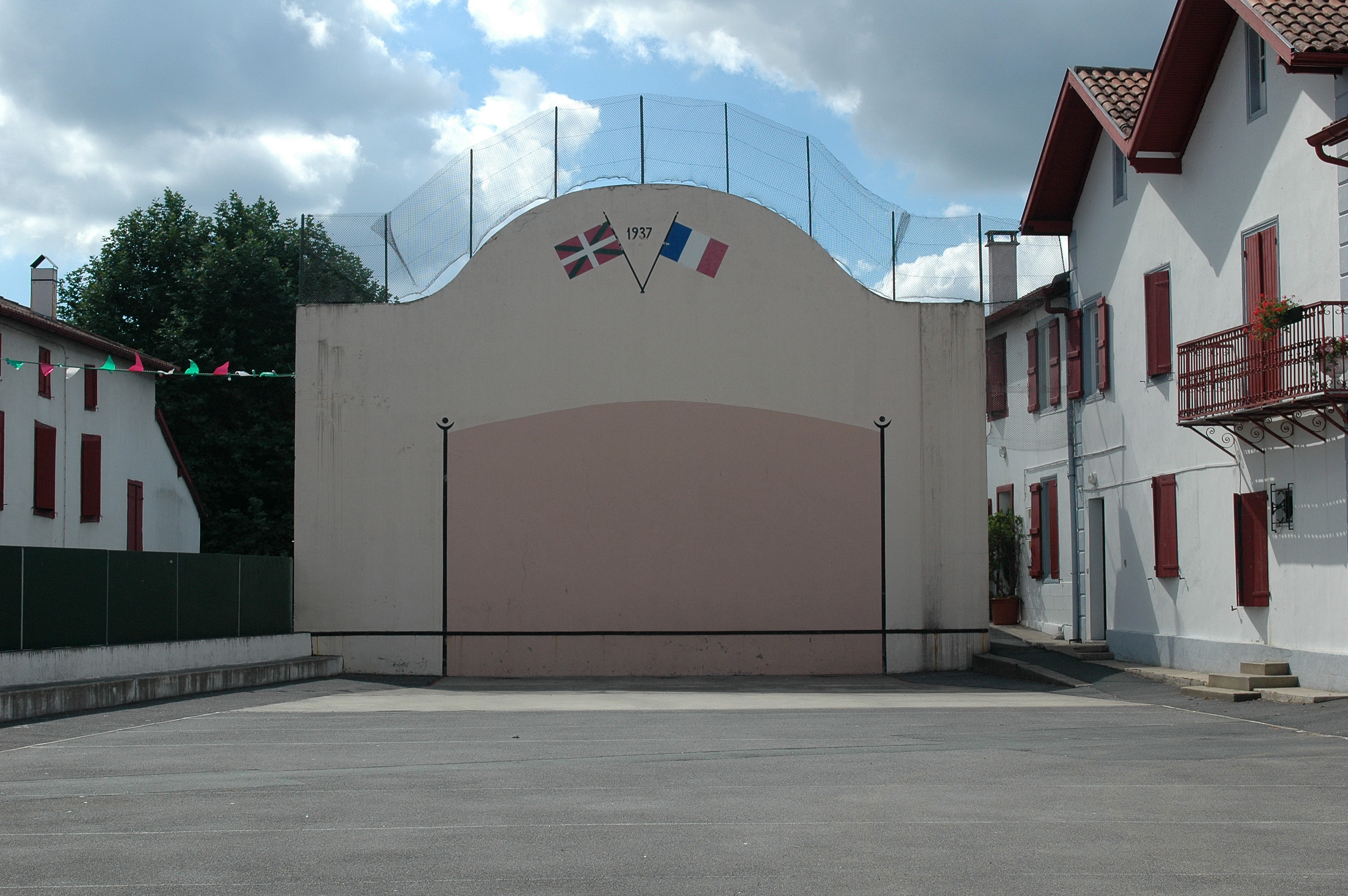 Louhossoa, le fronton. Photo prise le 03/08/06 par Harrieta171